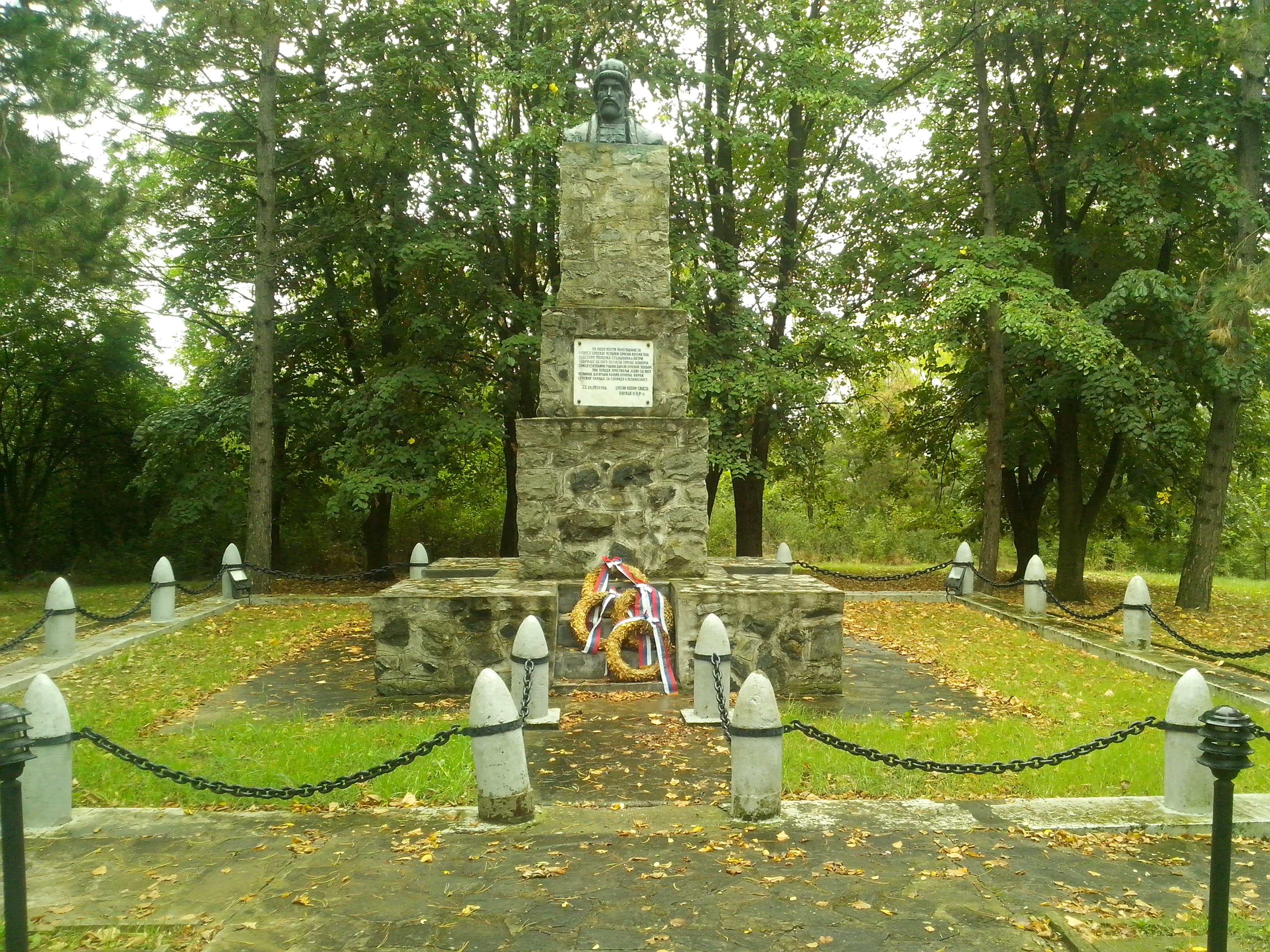 Spomenik boju na Ivankovcu.